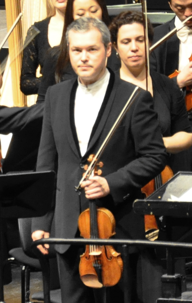 Vadim Repin, Salzburger Pfingstfestspiele 2013